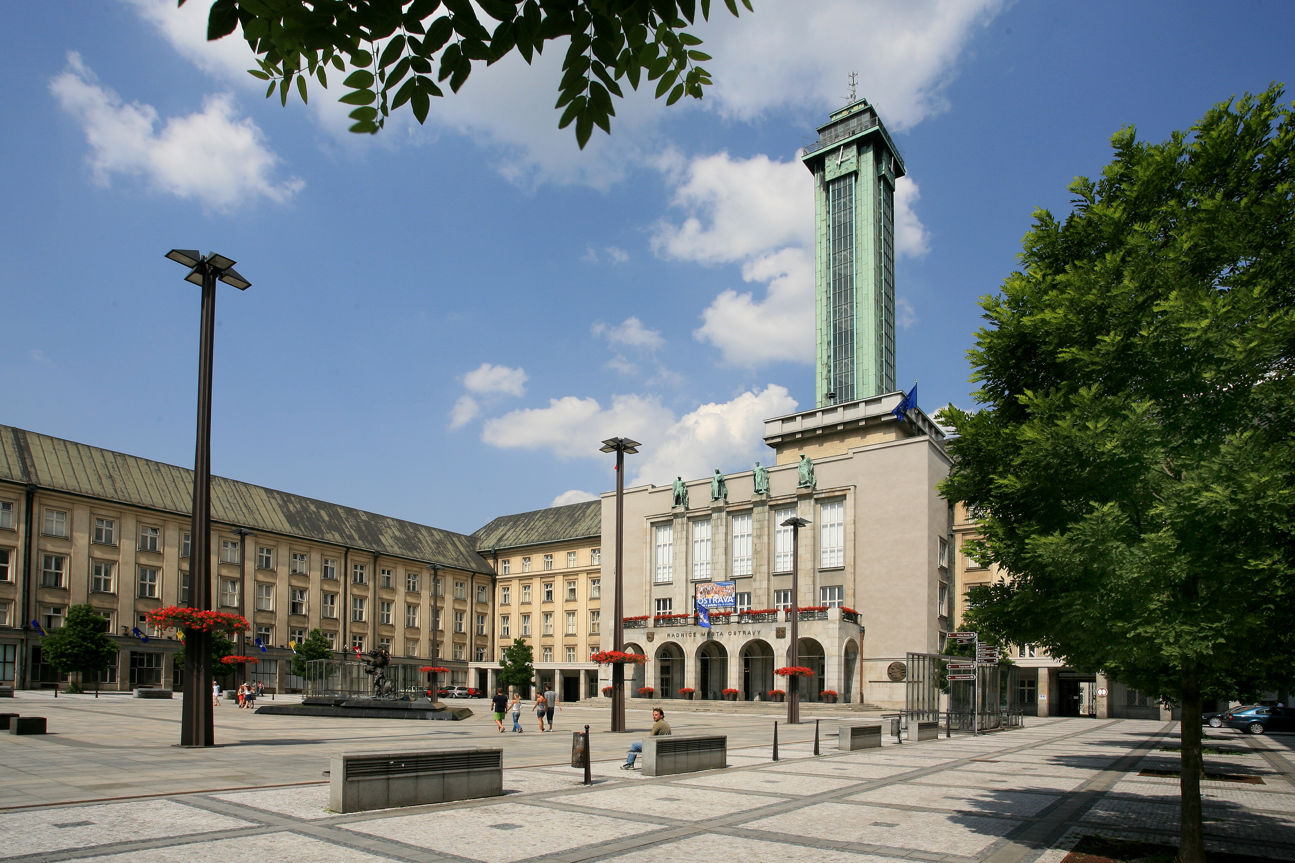 Nová radnice